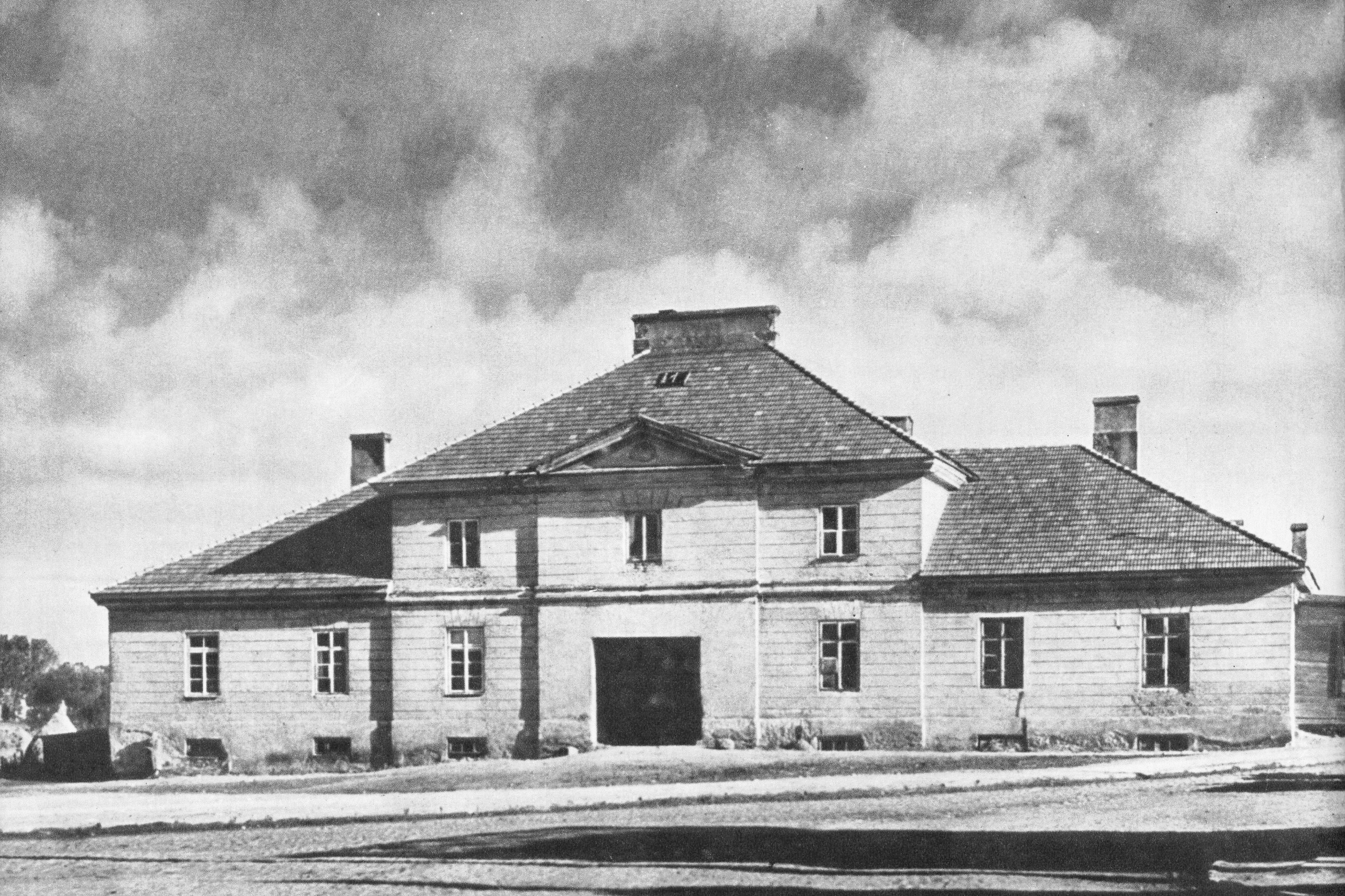 Karczma przy ul. Łęczyńskiej w Lublinie z I połowy XIX wieku.